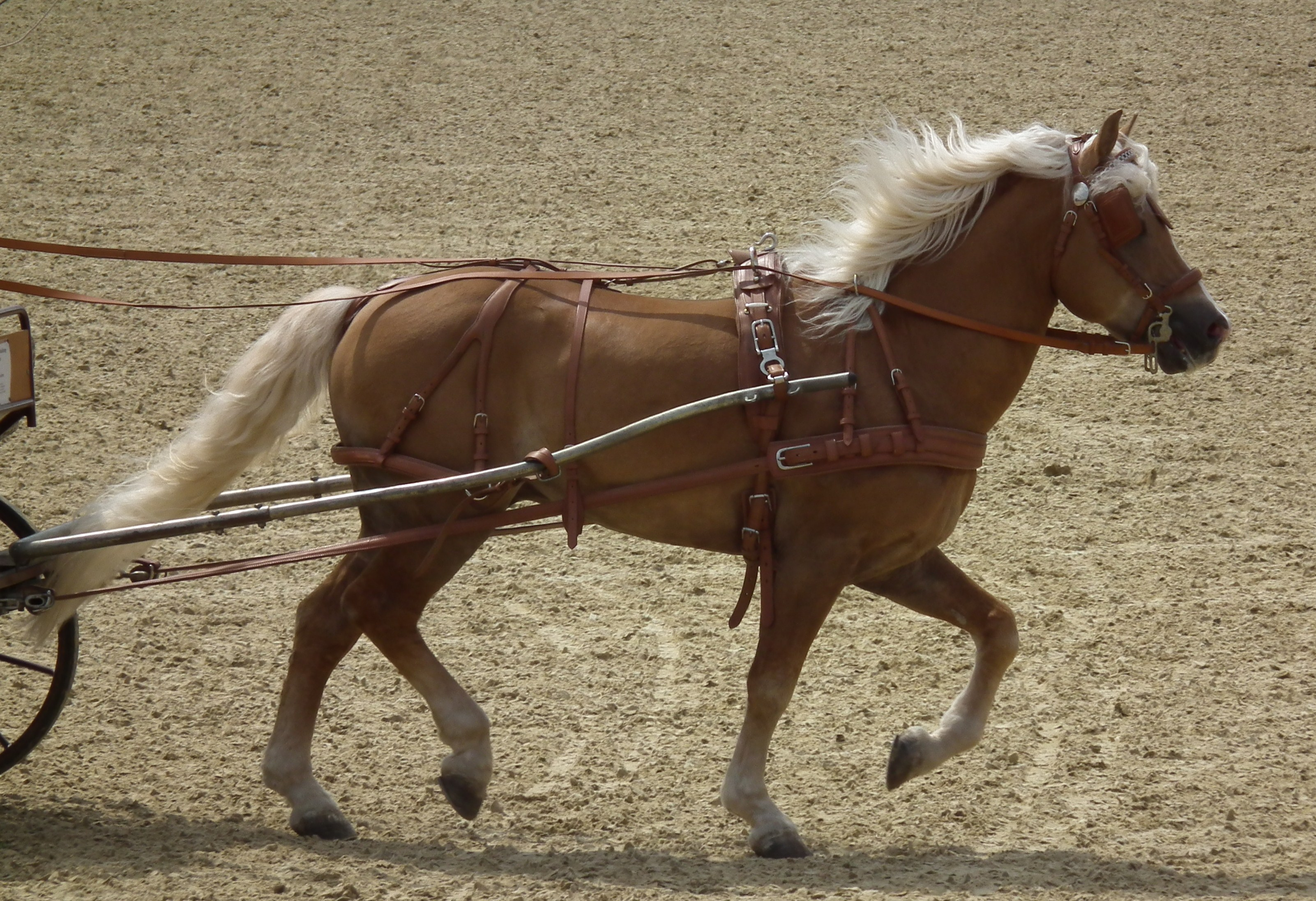 Anspannung eines Haflingers vor einer Kutsche